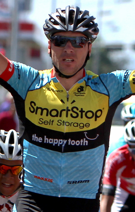 Jure Kacjan